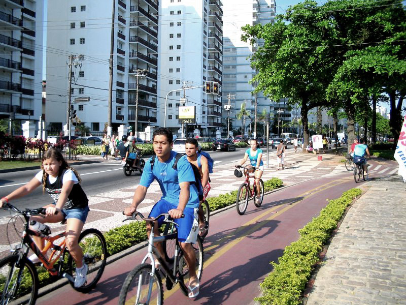 Santos